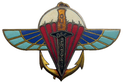 Insigne du 2e régiment de parachutistes coloniaux